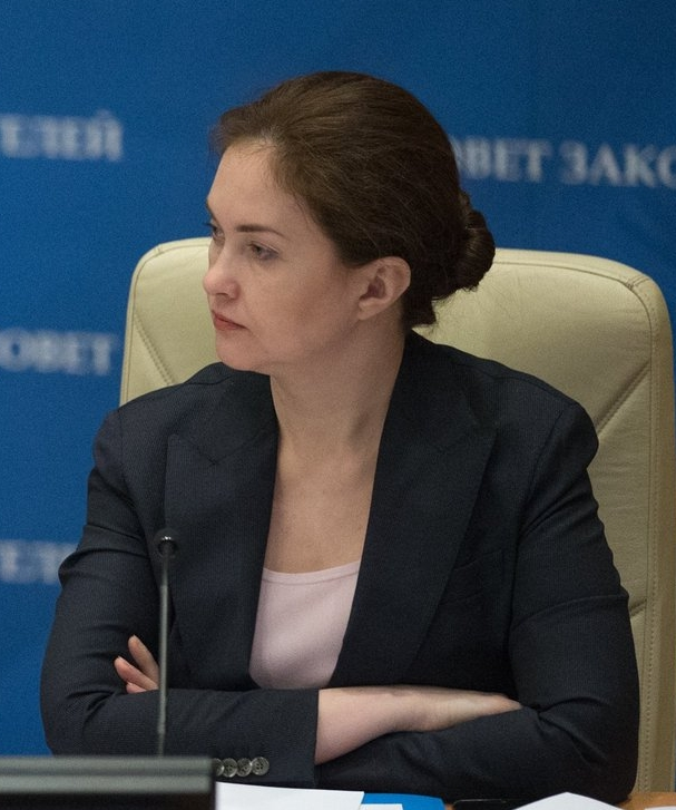 Татьяна Геннадьевна Воронова — российский государственный и политический деятель